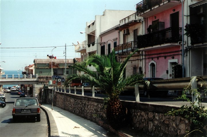 Santa Teresa di Riva, Quartiere Ciumaredda Porto Salvo